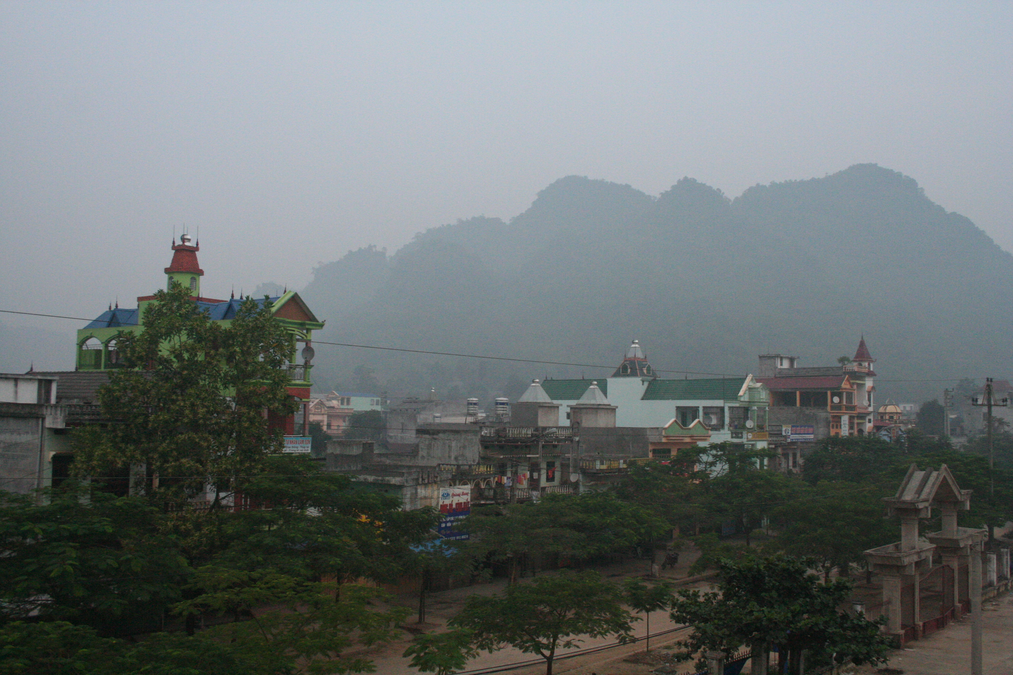 Thị trấn Bằng Lũng trong sương sớm